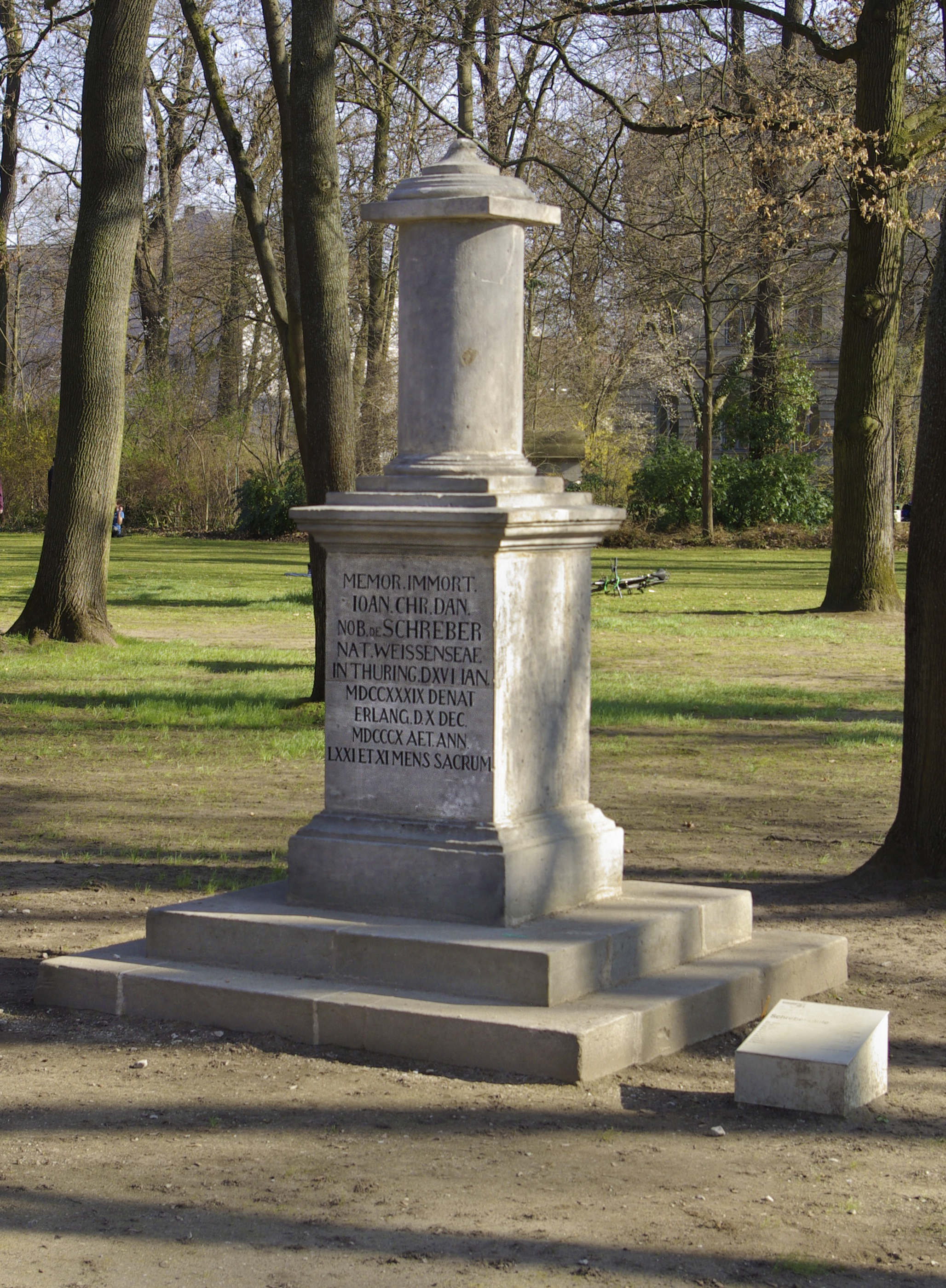 Schrebersäule im Erlanger Schlossgarten. Die Säule wurde 1810 zum Gedenken an Johann Christian von Schreber von dessen Witwe gestiftet. Nach Verlegung des Botanischen Gartens wurde das Denkmal 1827 an seinen heutigen Standort verlegt.